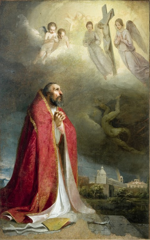 San Possidonio è inginocchiato in preghiera, le mani giunte lo sguardo rivolto al cielo. Il cielo che lo sovrasta è minaccioso e nero, rotto da una gloria angelica che accompagna un crocifisso circondato di luce. Sullo sfondo la città di Mirandola. Il dipinto fu commissionato dalla città di Mirandola nel 1836/1837 quale voto durante la pestilenza di colera di quegli anni. L'artista, così come ricorda il Ceretti, lo consegnò il 6 agosto 1841. Tale data, molto significativa per la città viene ricordata anche dall'Asioli e dal Cappi, il quale però sostiene che l'anno non fosse il 1841 bensì il 1840.